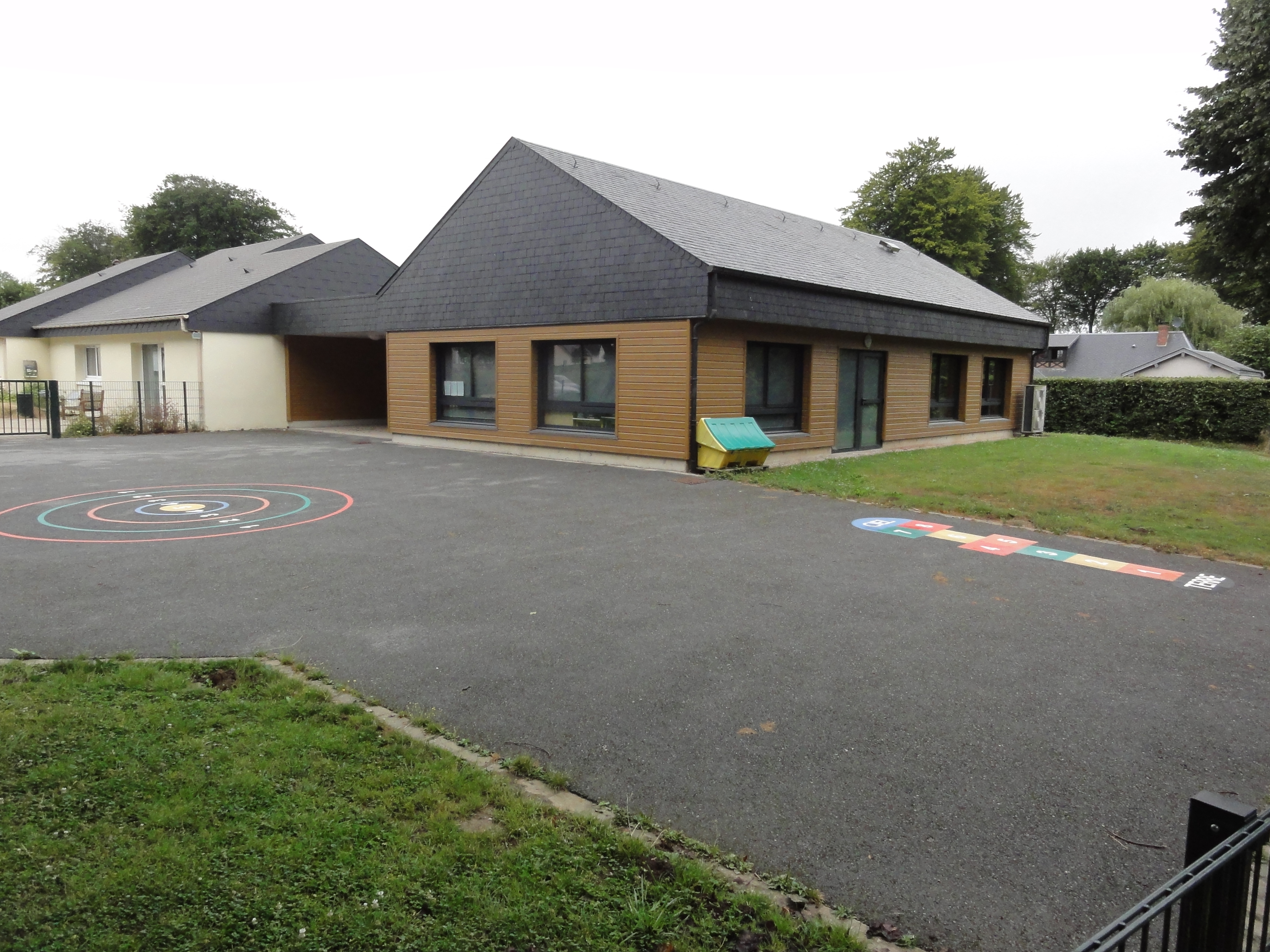 Mentheville (Seine-Mar.) école maternelle